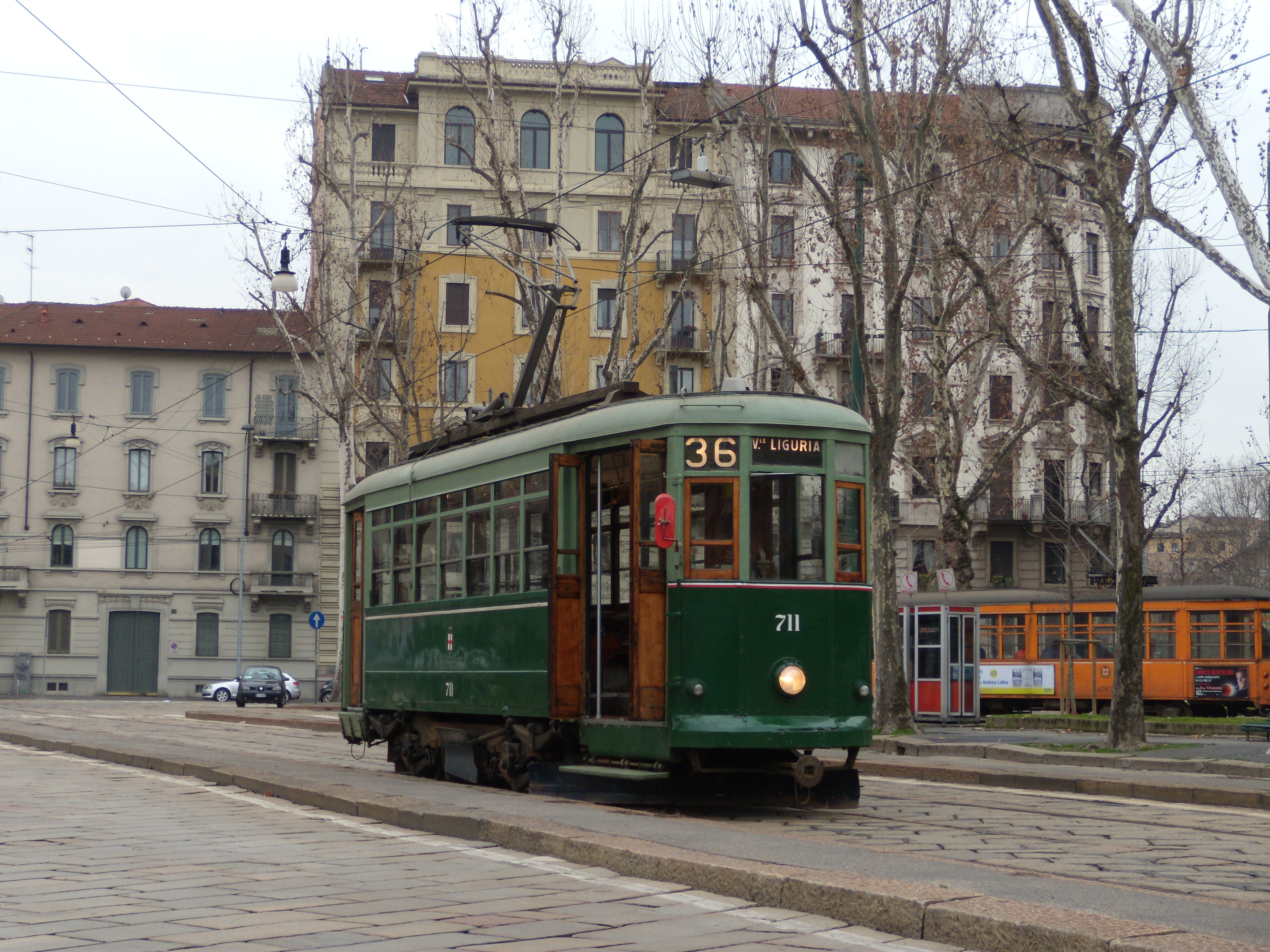 La 711 durante un noleggio, ripresa in piazzale Aquileia.